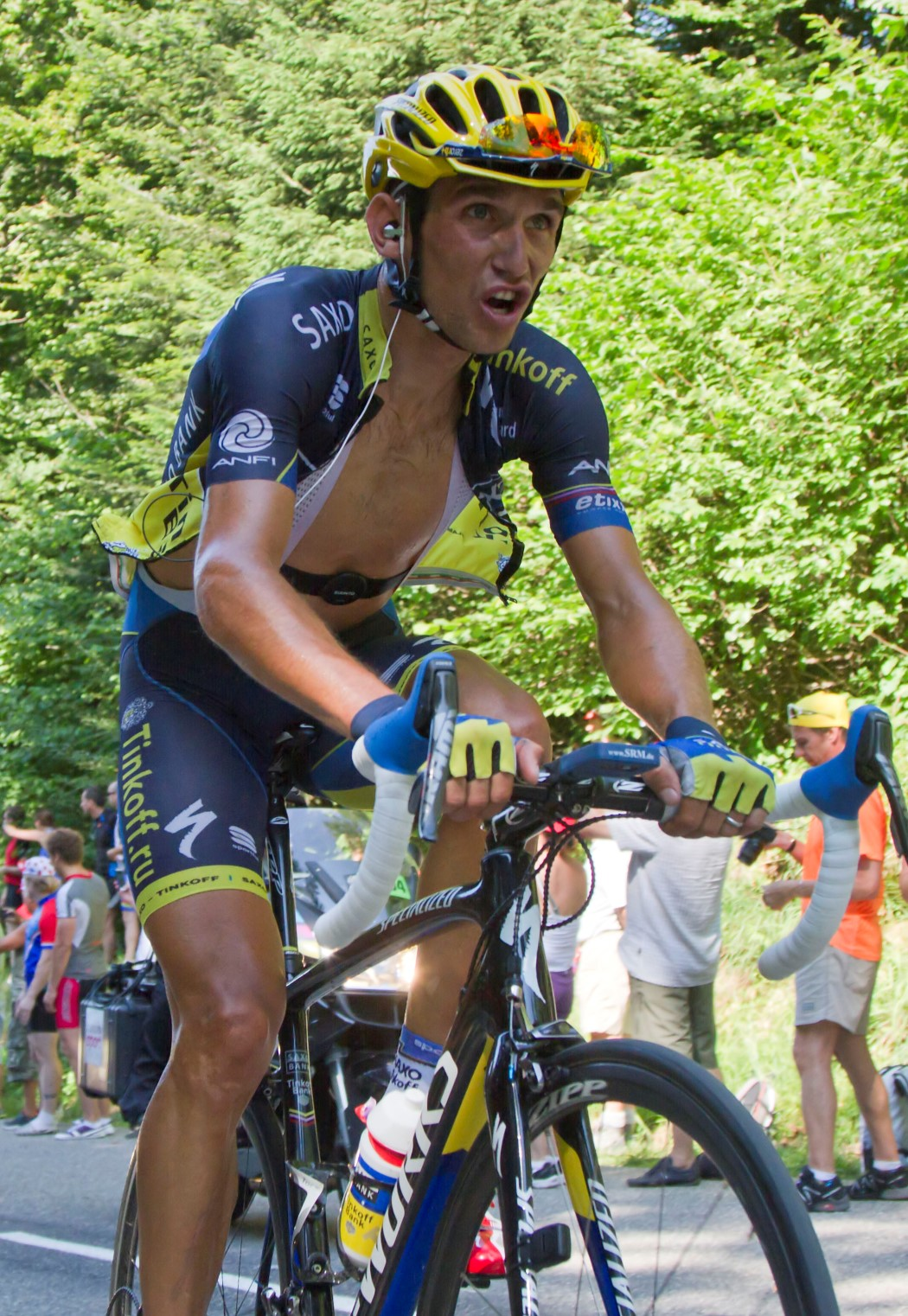 492 kreuziger